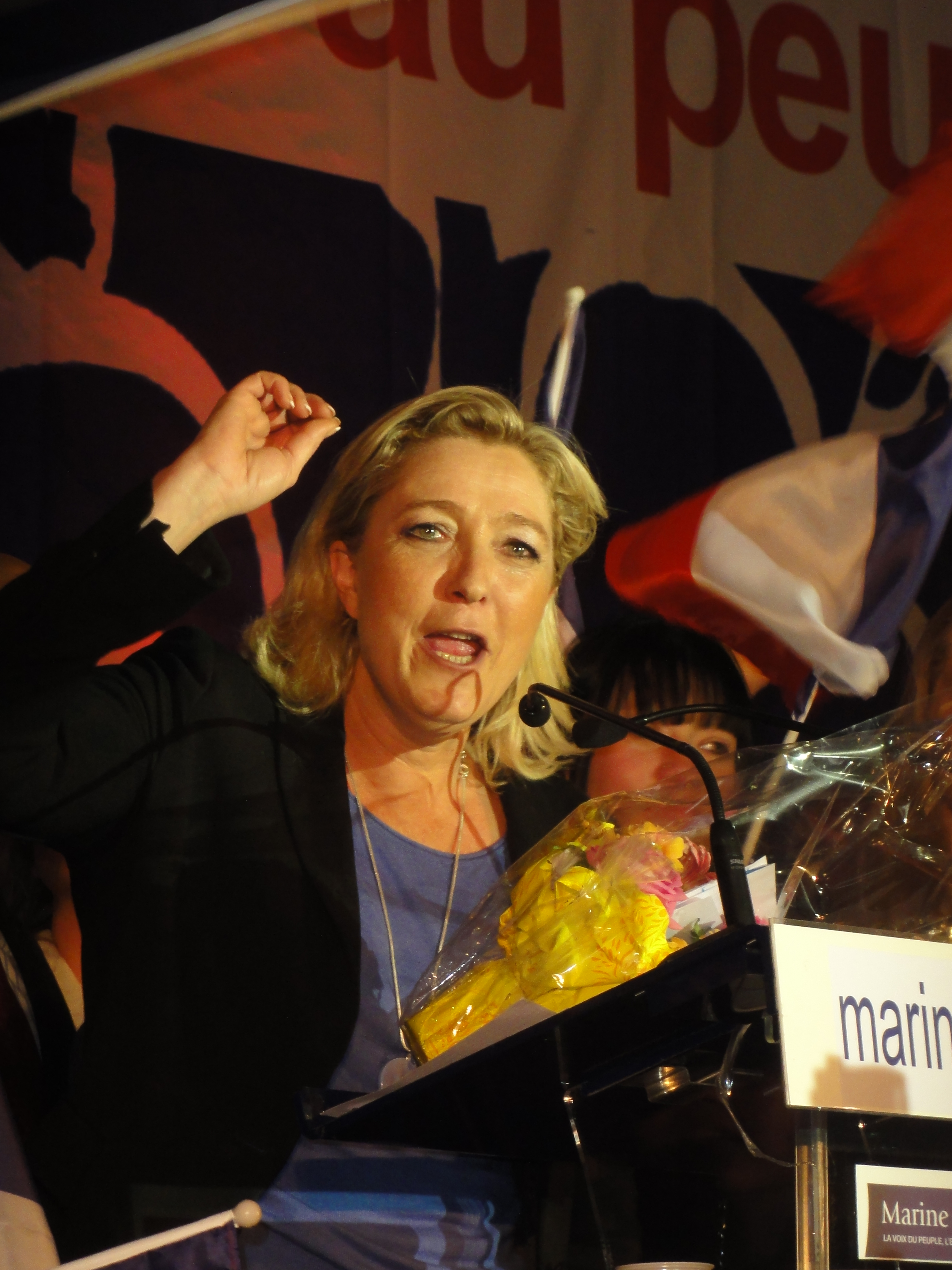 Marine Le Pen au Parlement des Invisibles à Hénin-Beaumont le dimanche 15 avril 2012.